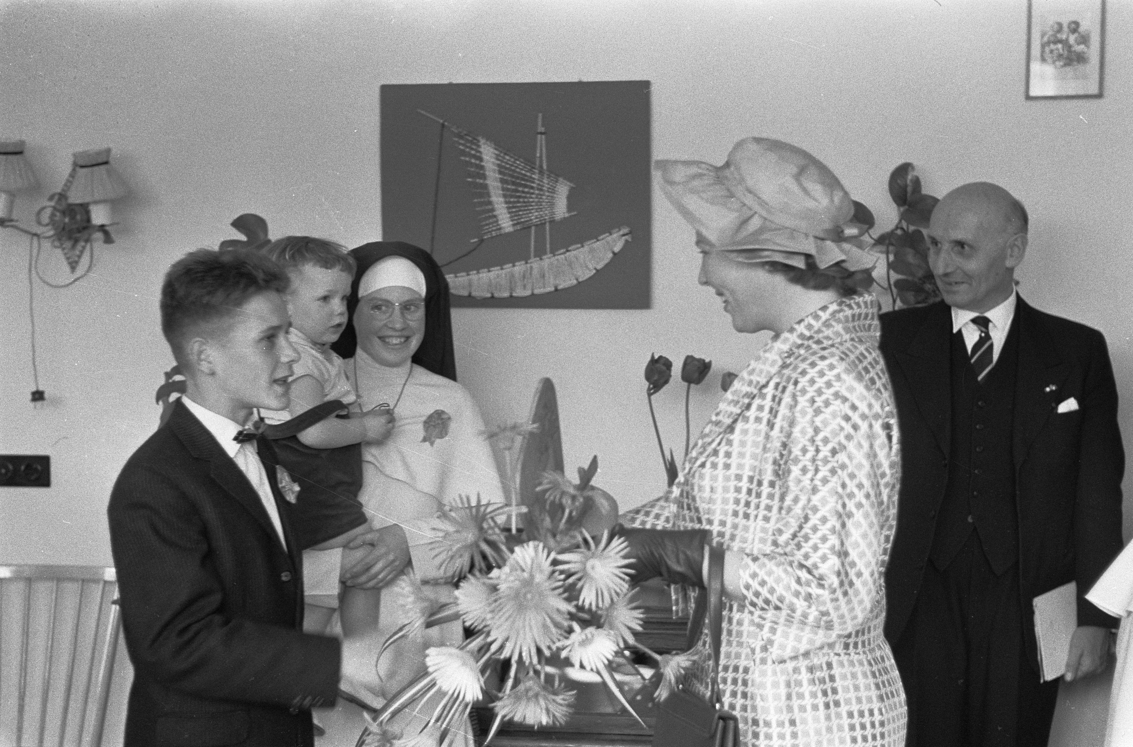 Collectie / Archief : Fotocollectie Anefo Reportage / Serie : [ onbekend ] Beschrijving : Prinses Beatrix bezoekt Limburg Datum : 6 mei 1960 Locatie : Limburg Persoonsnaam : Beatrix, prinses Fotograaf : Pot, Harry / Anefo Auteursrechthebbende : Nationaal Archief Materiaalsoort : Negatief (zwart/wit) Nummer archiefinventaris : bekijk toegang 2.24.01.05 Bestanddeelnummer : 911-2260 Reacties Geplaatst door Royalfan op 14 september 2016 - 17:08. Opening RK jeugddorp Bethanië te Horn. Mogelijk huize 'de Elzenhof' met de 14 jarige Kees Jansen (Eén van de veertien kinderen die in dit huis in het jeugddorp woont.)